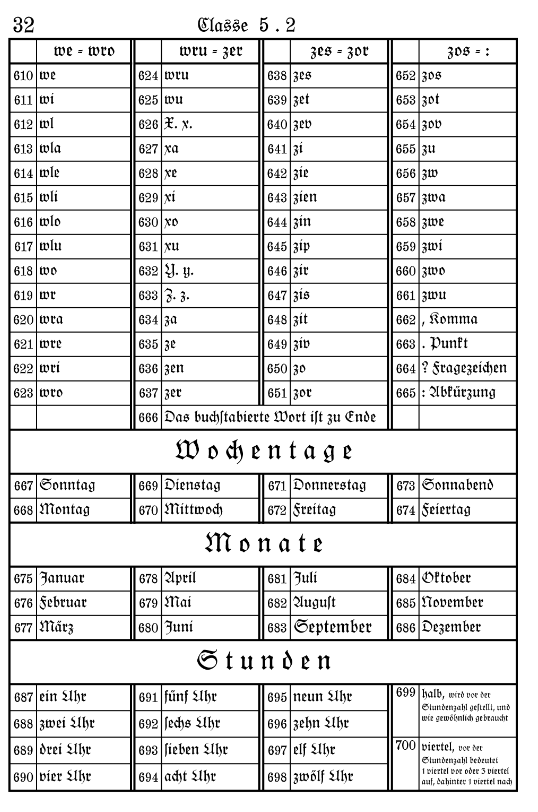 Seite 32 des „Wörterbuch für die Telegraphisten-Correspondenz“ der „Classe 5.2 zum Preußischen optischen Telegraphen im neuen Satz von Wilfried Hahn